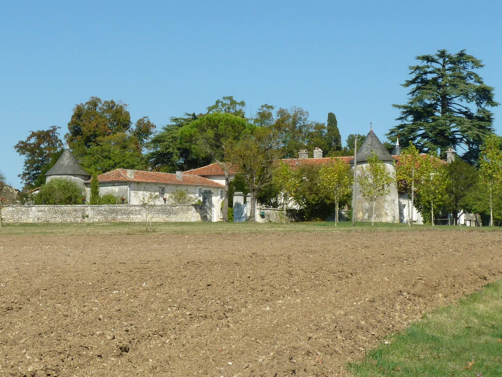 château de la Ligerie à Fontaines, Champagne-et-Fontaine (24), France